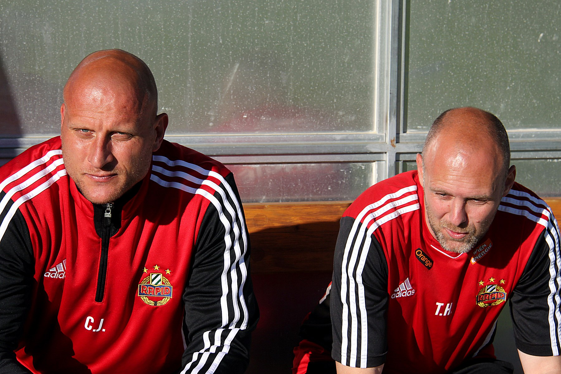 Meisterschaftsspiel der österreichischen Bundesliga: SV Mattersburg gegen SK Rapid Wien am 18. Mail 2013 (2:0)] im Mattersburger Pappelstadion.] - Das Foto zeigt die Co-Trainer des SK Rapid Wien Carsten Jancker (links) und Thomas Hickersberger.